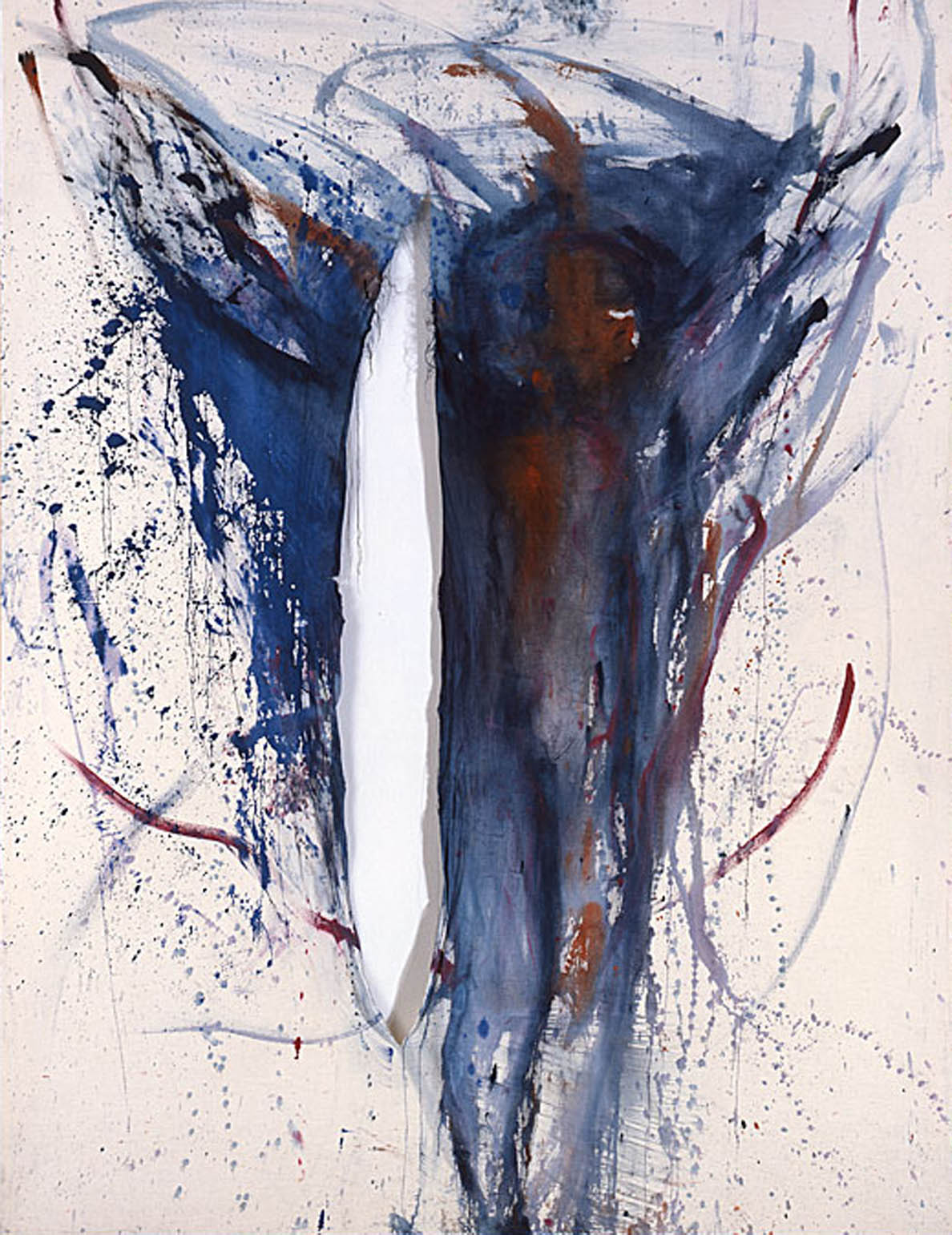 Malerei als Ereignis im Künstlerhaus Bethanien, Berlin mit dem Sänger Mark Eins und der experimentellen Rockband DIN-A-Testbild am Gründonnerstag 1980, Sammlung Pax-Christi-Kirche, Krefeld - Maße 210 x 165 cm